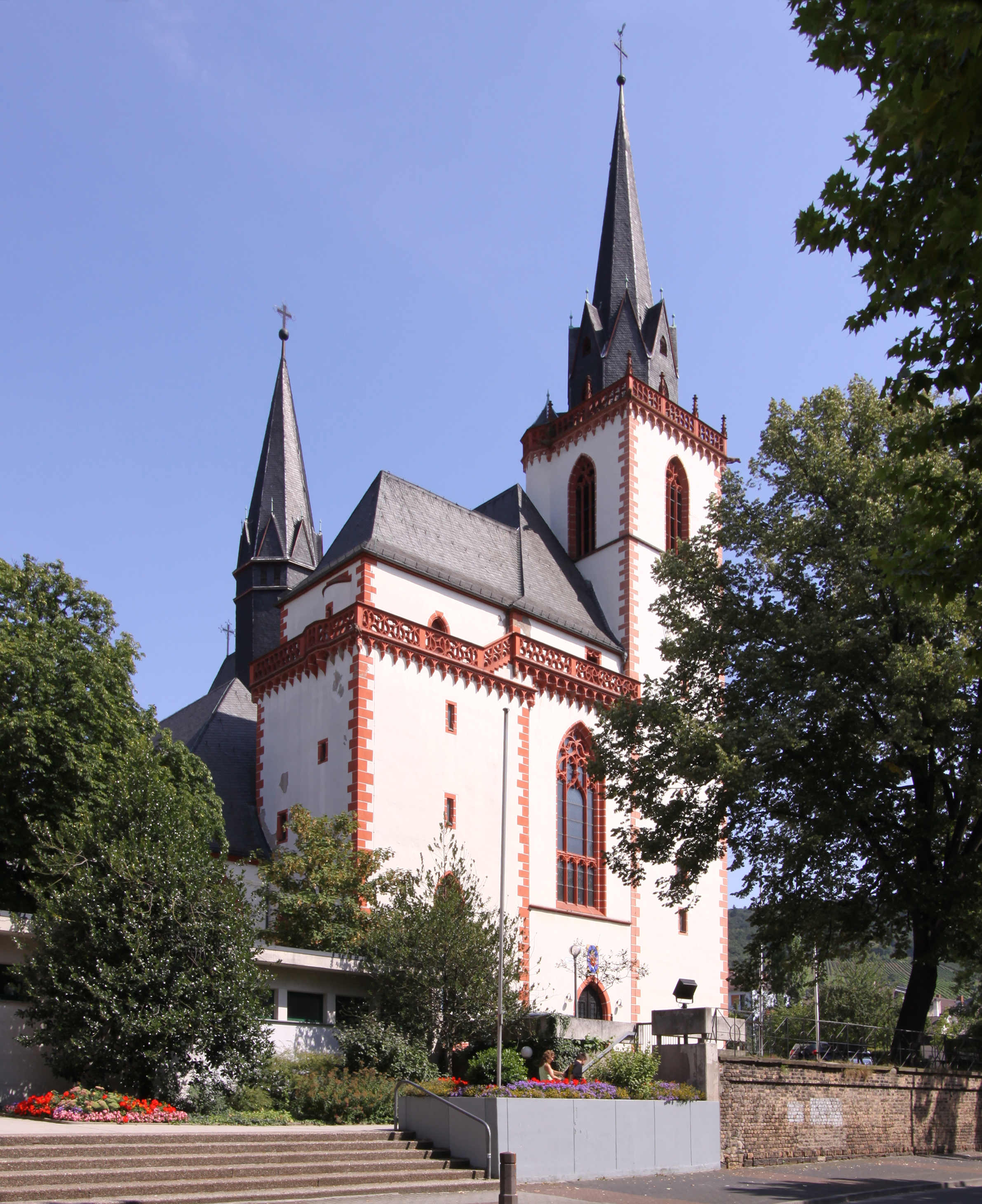 Ehemalige Stiftskirche, heutige Pfarrkirche St. Martin in Bingen am Rhein/Deutschland - Westseite